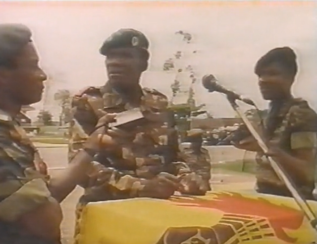 Le général Mahele s'adressant aux soldats entre 1991 et 1993, les invitant à respecter la loi et à protéger la paix